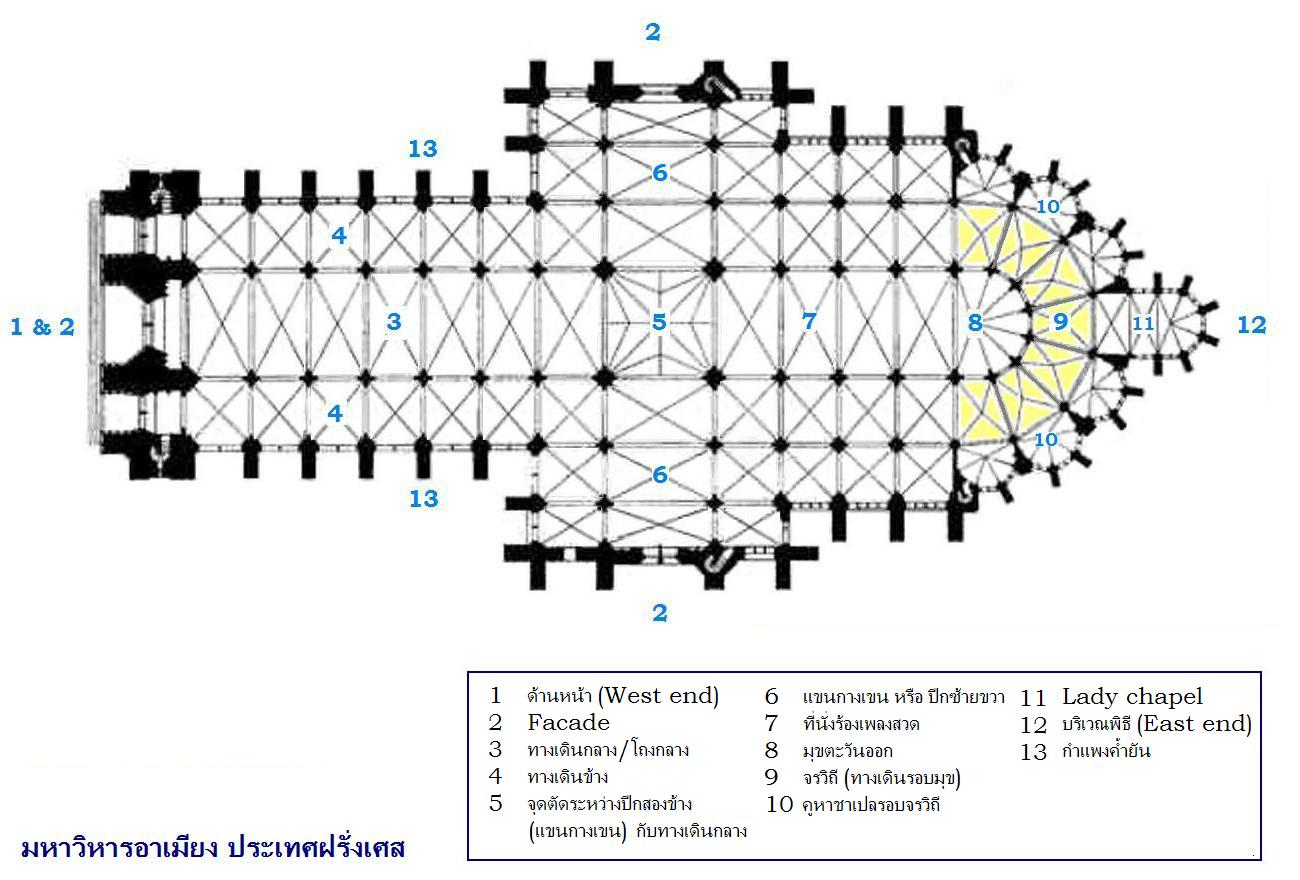 Amiens. Floorplan, from G. Dehio and G. von Bezold, Die Kirchliche Baukunst des Abendlandes, Stuttgart, 1887-1902, plate 363 Lithograph